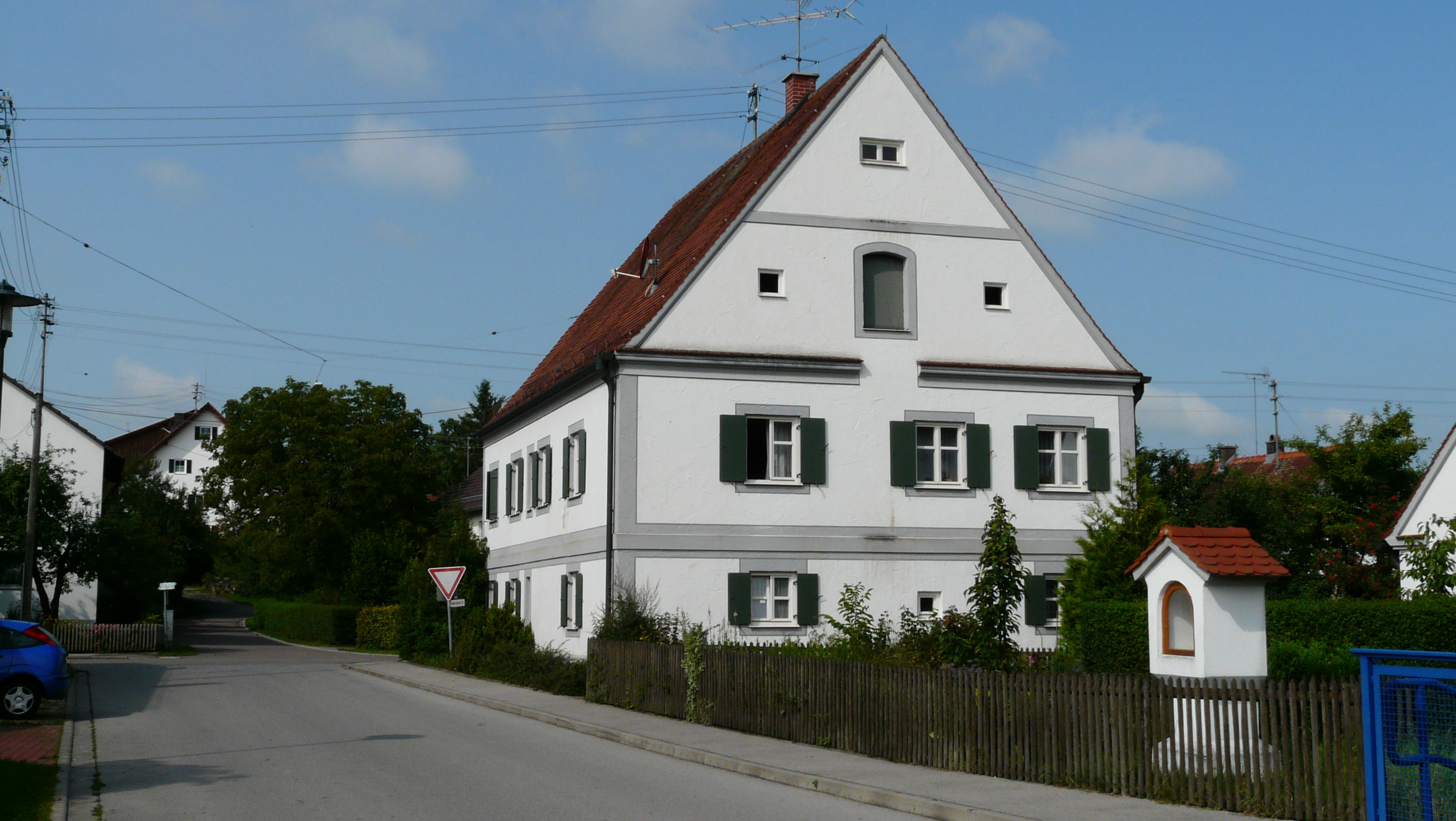 Pfarrhof in Obergessertshausen, Aichen